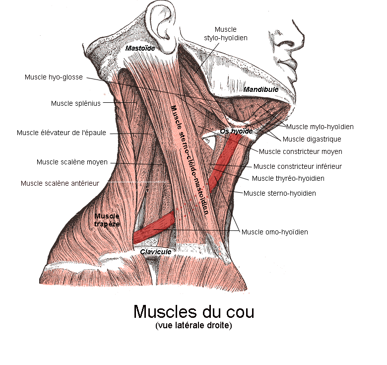 Muscle omo-hyoïdien. Vue larérale du cou. Anatomie humaine